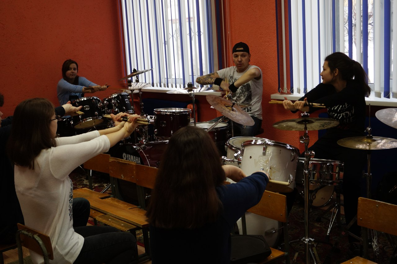 Мастер-классы для участников фестиваля.